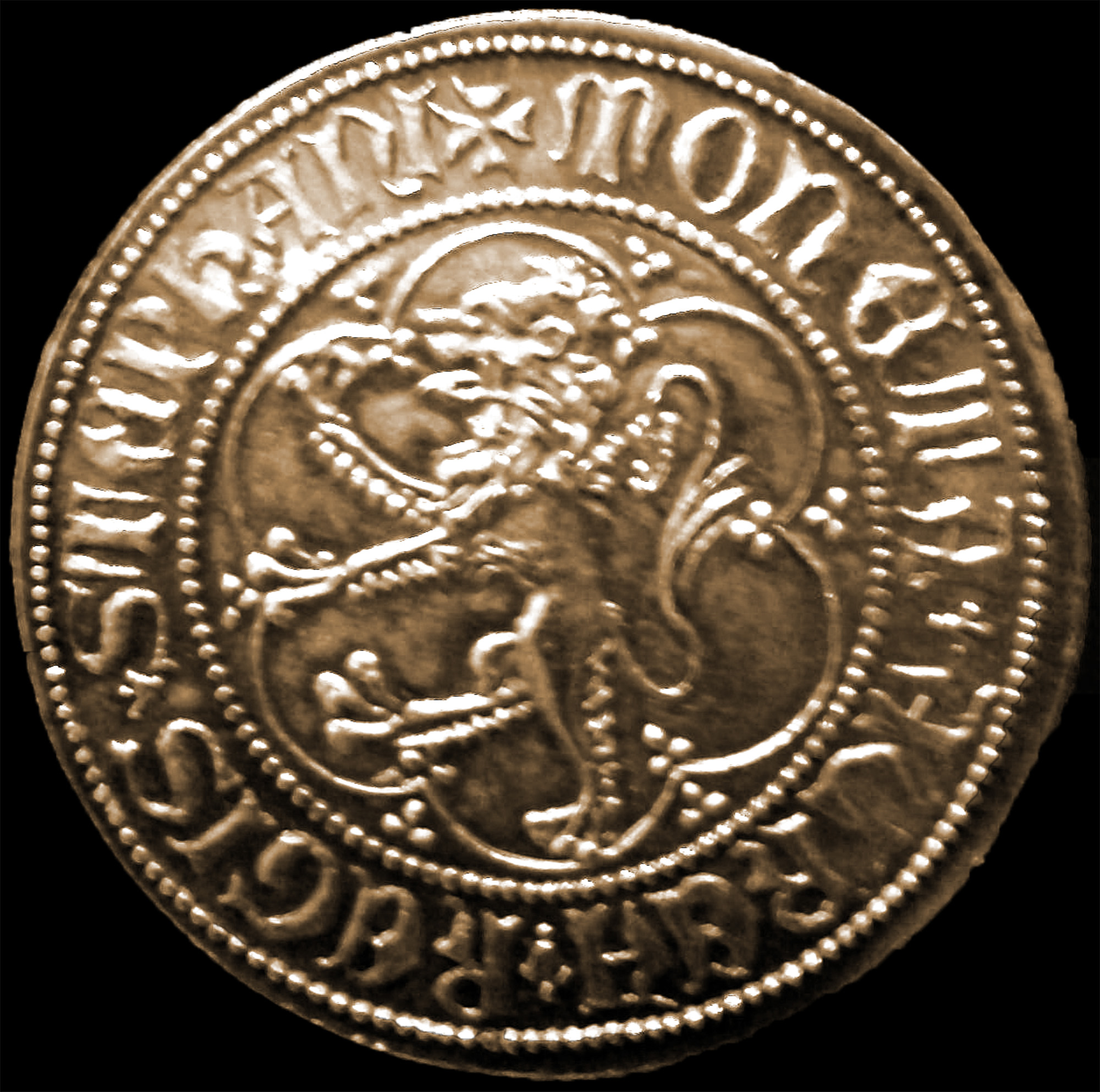 Zlatnik kralja Tvrtka I (četverostruki) - avers